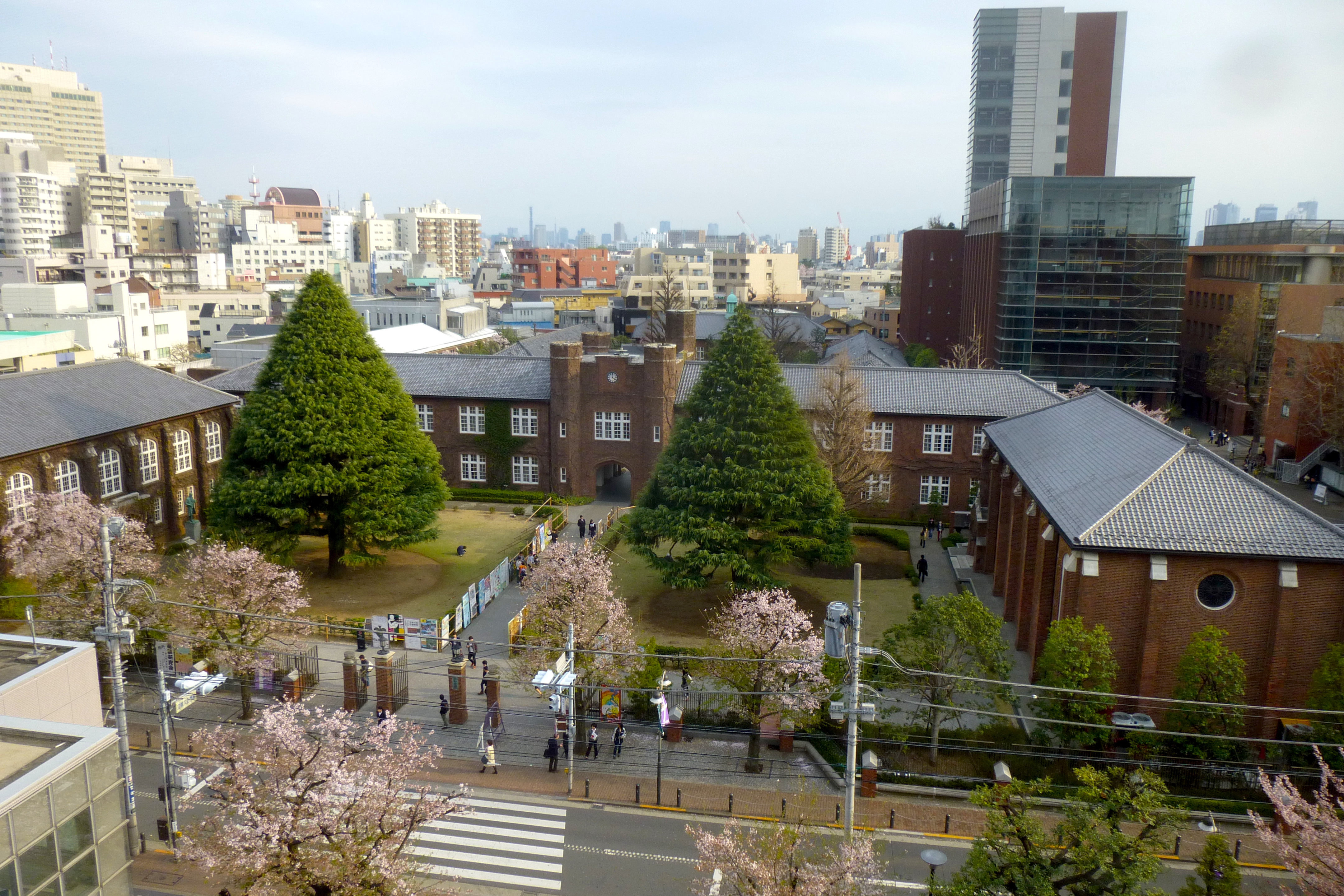 Rikkyo University (立教大学)